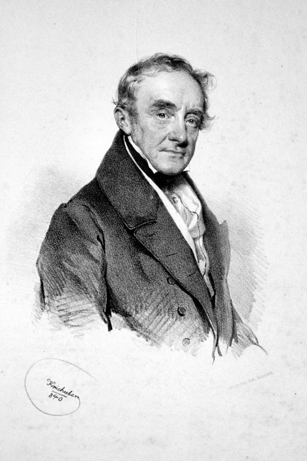 Johann Georg Scherzer Senior (1775-1858) Weinhändler, Gastwirt "Zum Sperl".